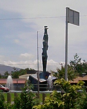 Fuente del Milenio en Pachuca.